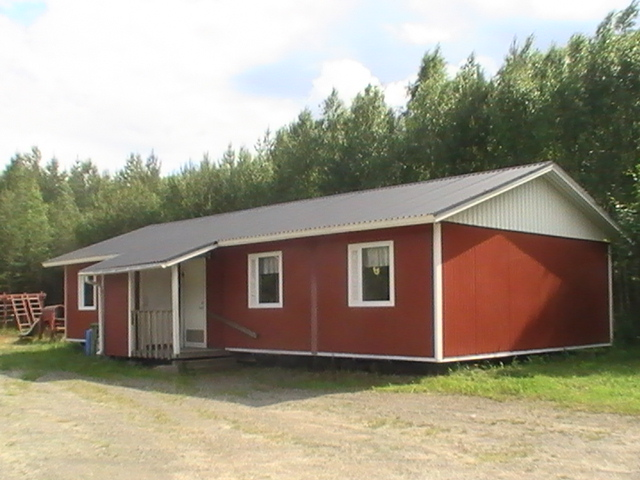 Juurussuon kylätalo, Kempeleen Juurussuon kylässä.